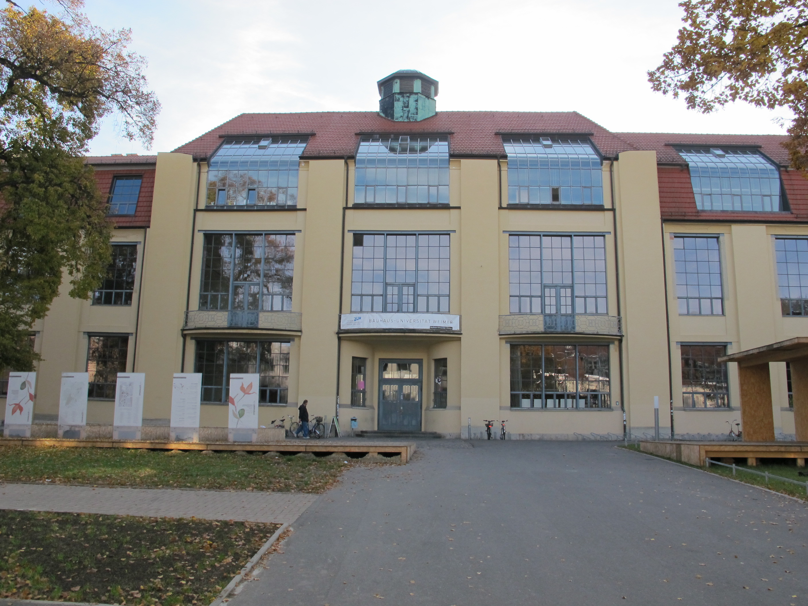 Bauhaus University Weimar